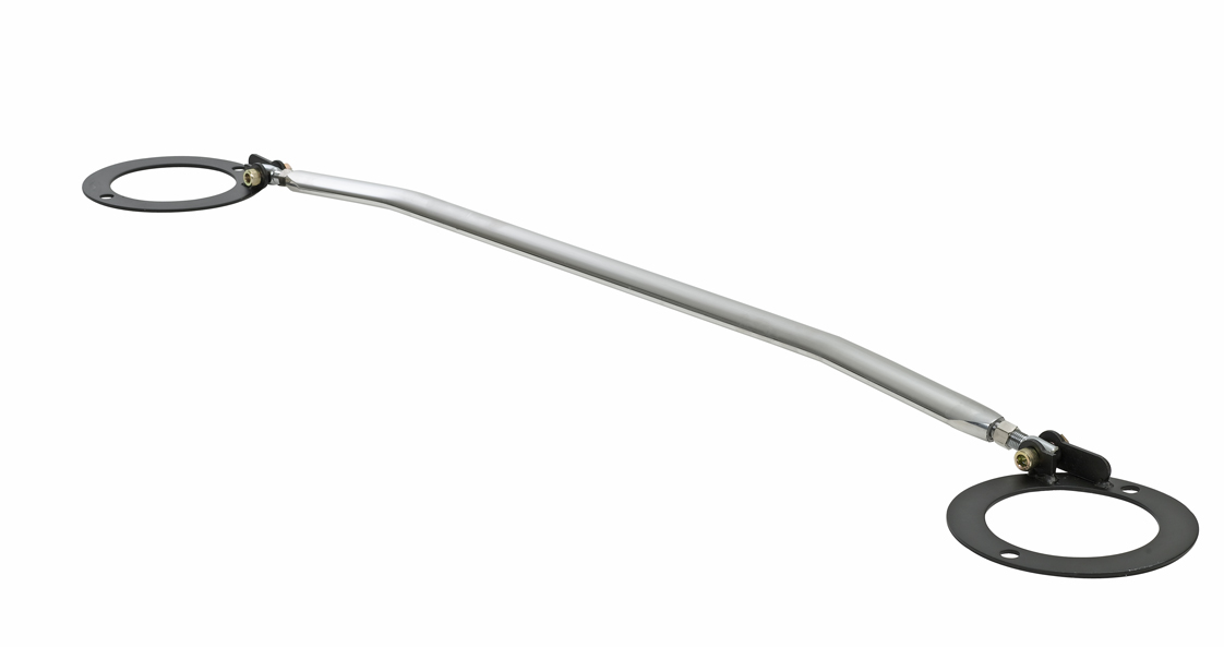 T-SPORT PR picture.